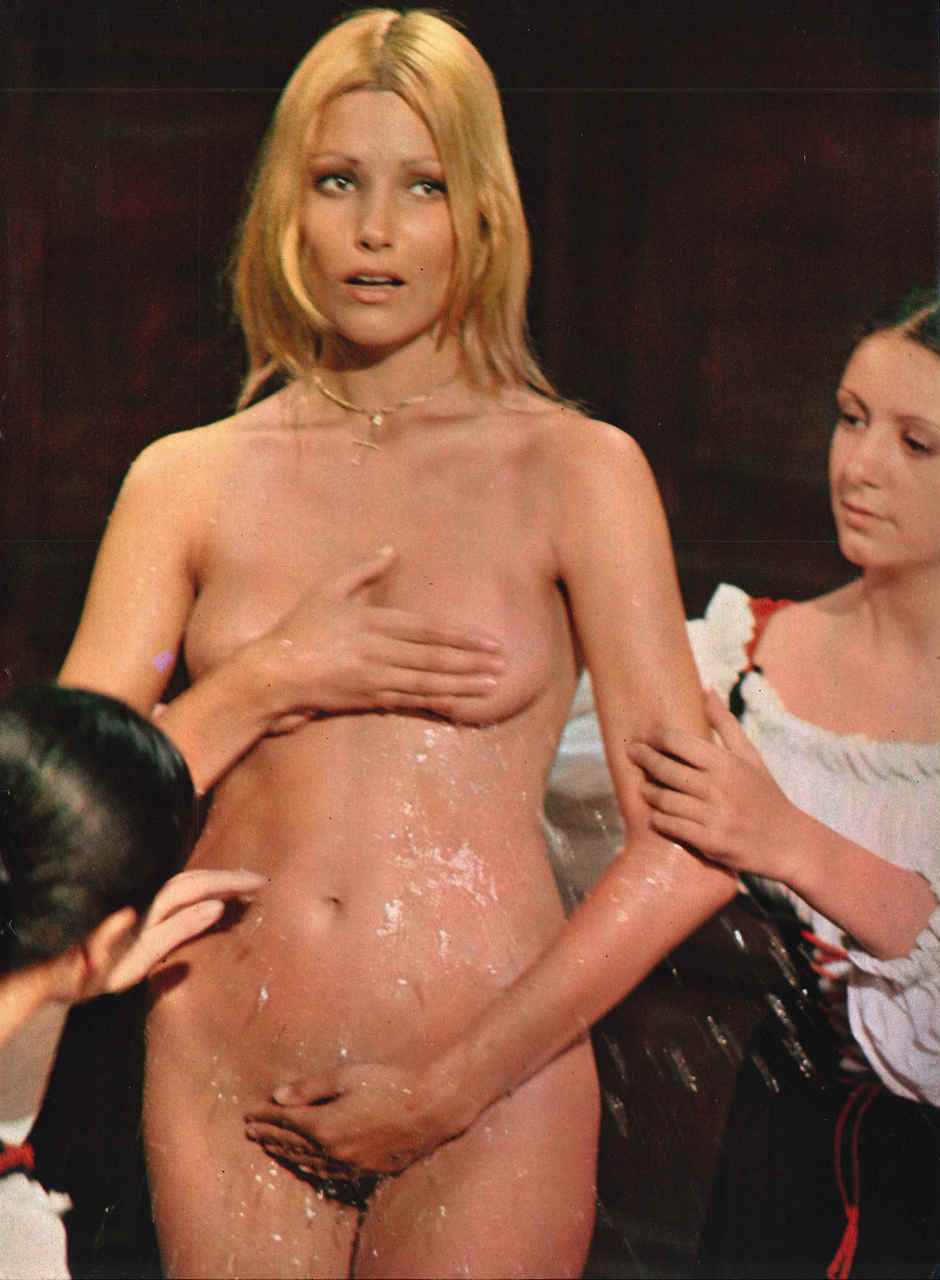 L'attrice svedese Janet Agren in uno scatto di scena sul set del film Racconti proibiti... di niente vestiti (1972) di Brunello Rondi.